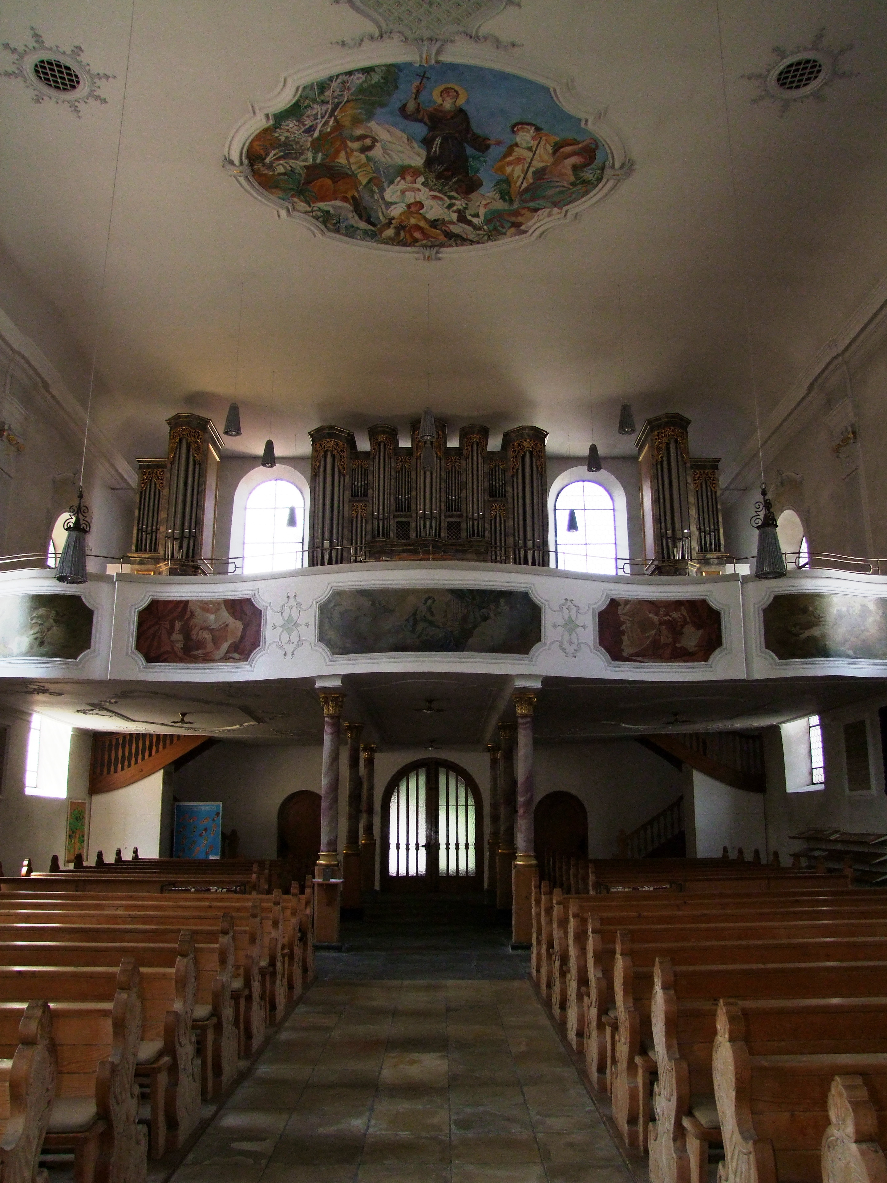 Stadtpfarrkirche St. Michael in Sonthofen.